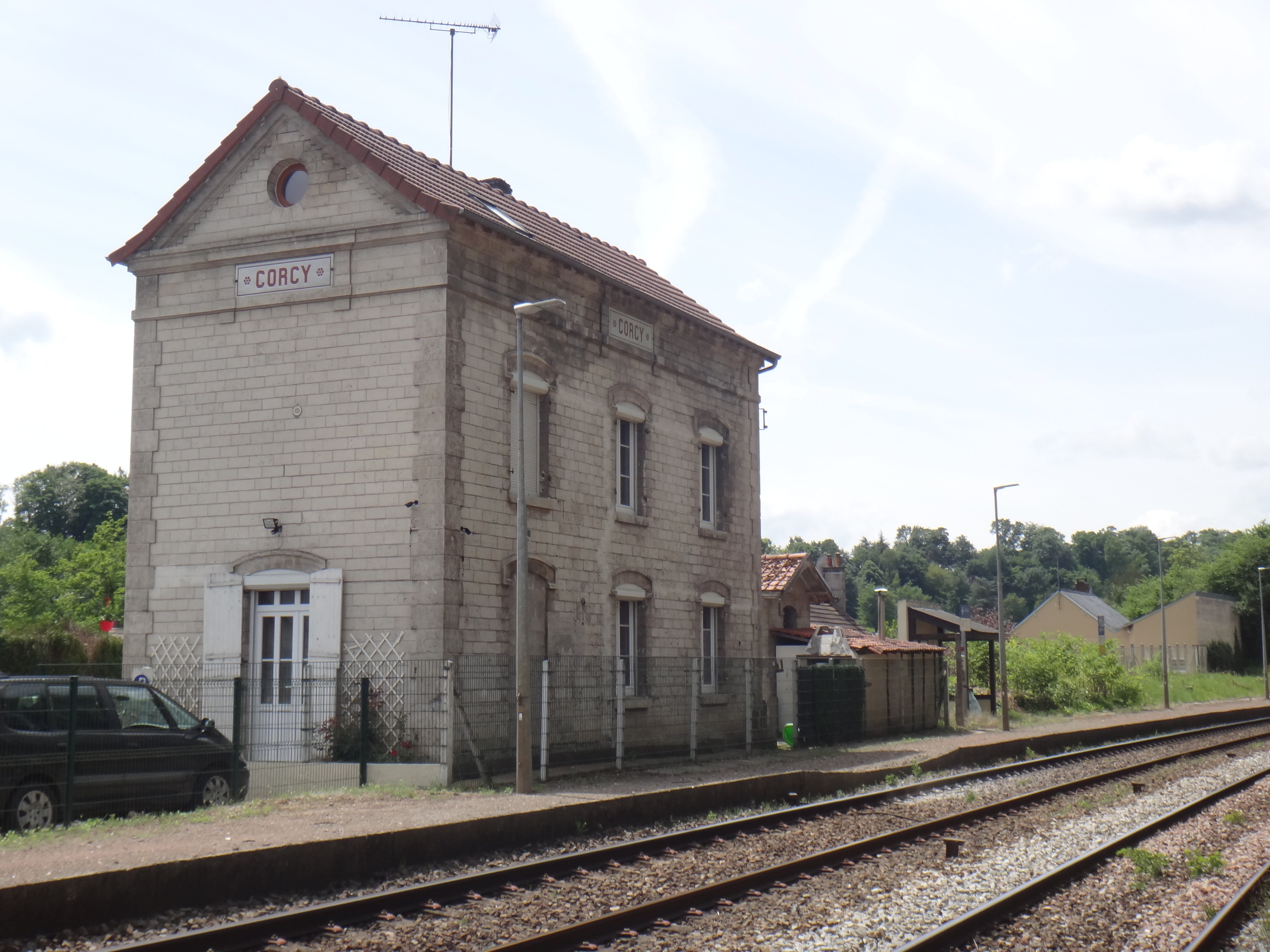 Bâtiment voyageurs de la gare de Corcy, Aisne, France.